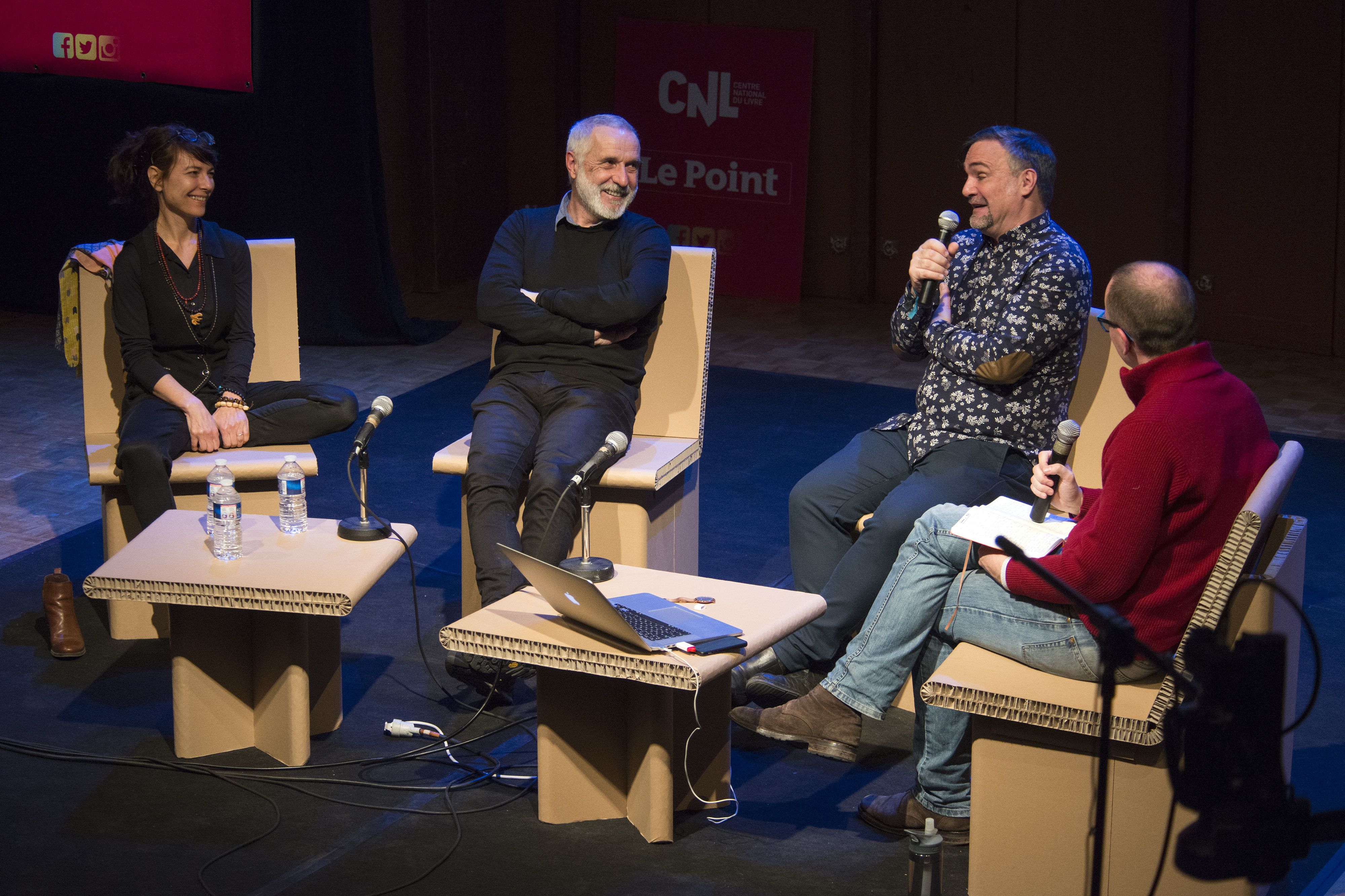 Rencontre sur le thème Couleur et bande dessinée animée par Sylvain Lesage avec les coloristes Isabelle Merlet et José Villarrubia et l'auteur Jean-Marc Rochette. Festival International de Bande Dessinée d'Angoulême 2019.